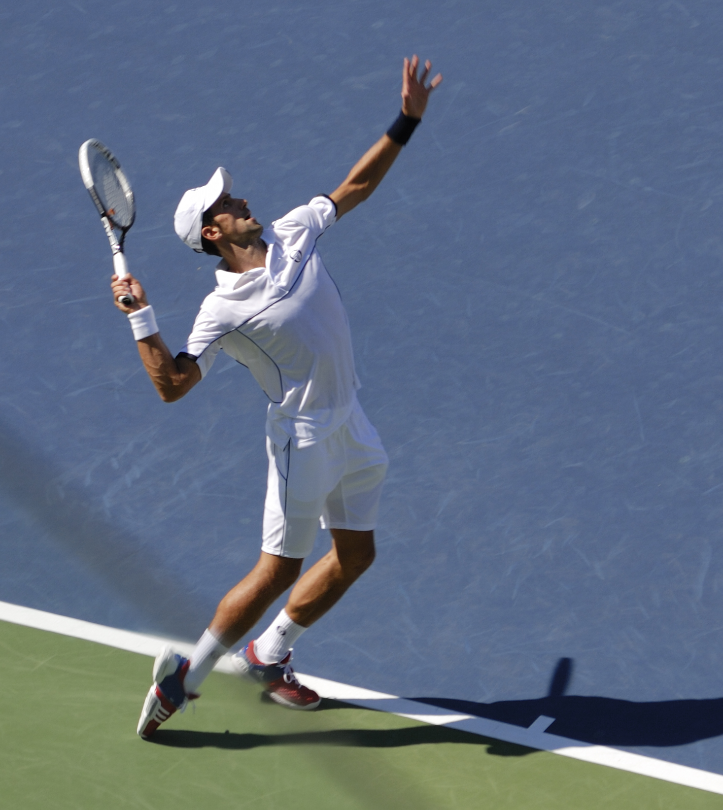 nole